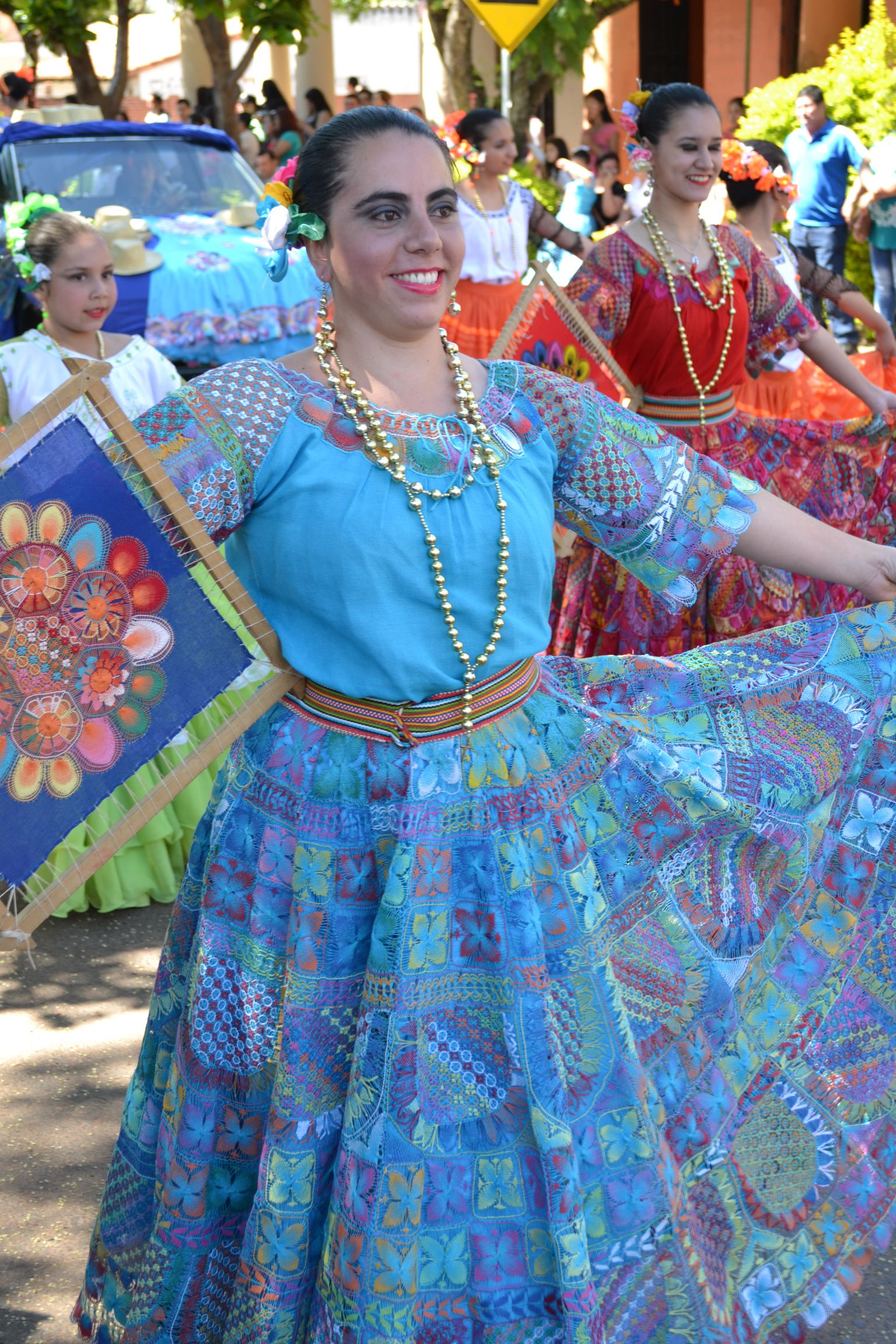 Joven mujer ataviada con un vestido tradicional paraguayo (typói) confeccionado con piezas de ñandutí, durante el desfile de Carrozas del Ñandutí en la ciudad de Itauguá, Paraguay. Octubre de 2016.